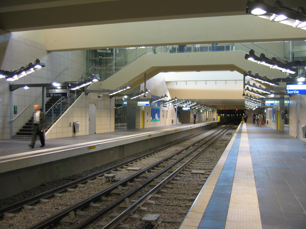 Asnières - Gennevilliers - Les Courtilles, ligne 13 du métro de Paris, le jour de l'inauguration.